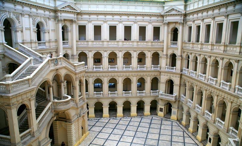 Warszawa (Polska)